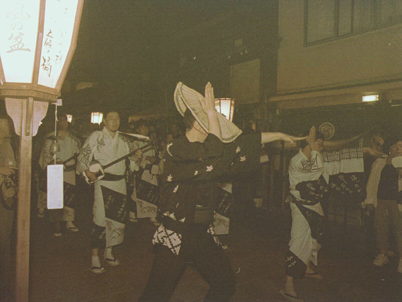 A picture of the autumn festival, called "Owara Kaze-no-Bon" in Japan. 毎年9/1～9/3に富山県富山市八尾町で行われる祭り ”おわら 風の盆”の写真 ：深夜の町流し（東新町支部）／公式スケジュール終了後の有志による深夜の町流しであるため、出番待ちの唄い手と思われる浴衣姿の男性（右端）も興に任せて踊りに加わっている。 Canon A-1 & TAMRON 17A 使用